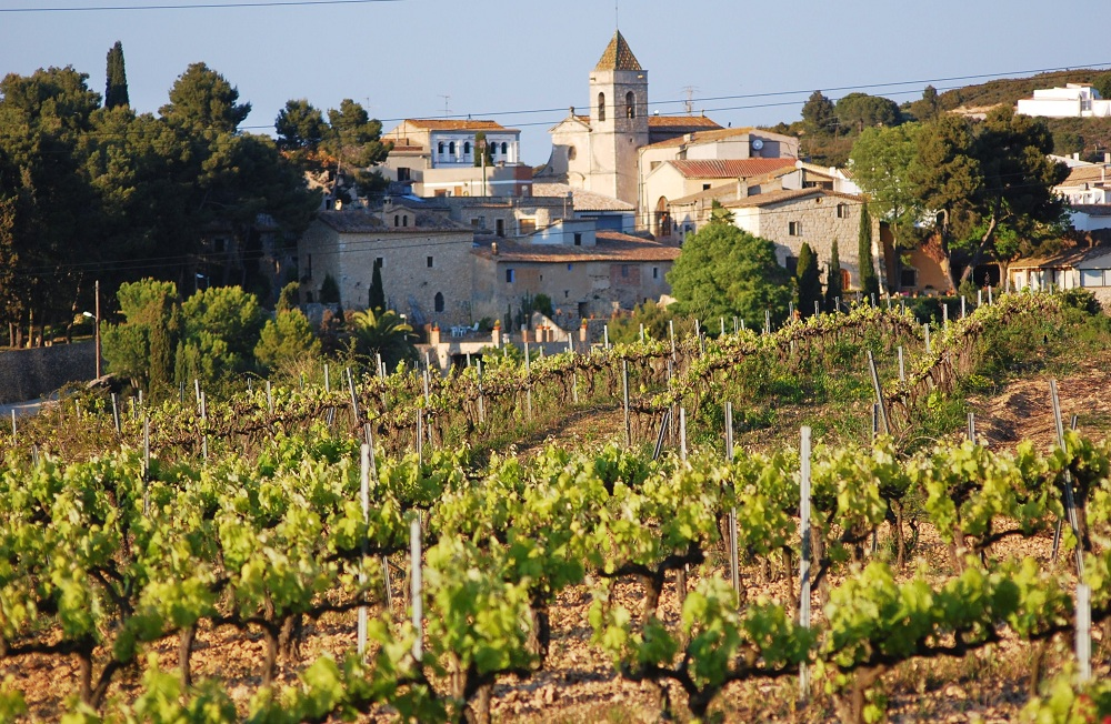 Església de Sant Salvador de les Gunyoles (Avinyonet del Penedès)